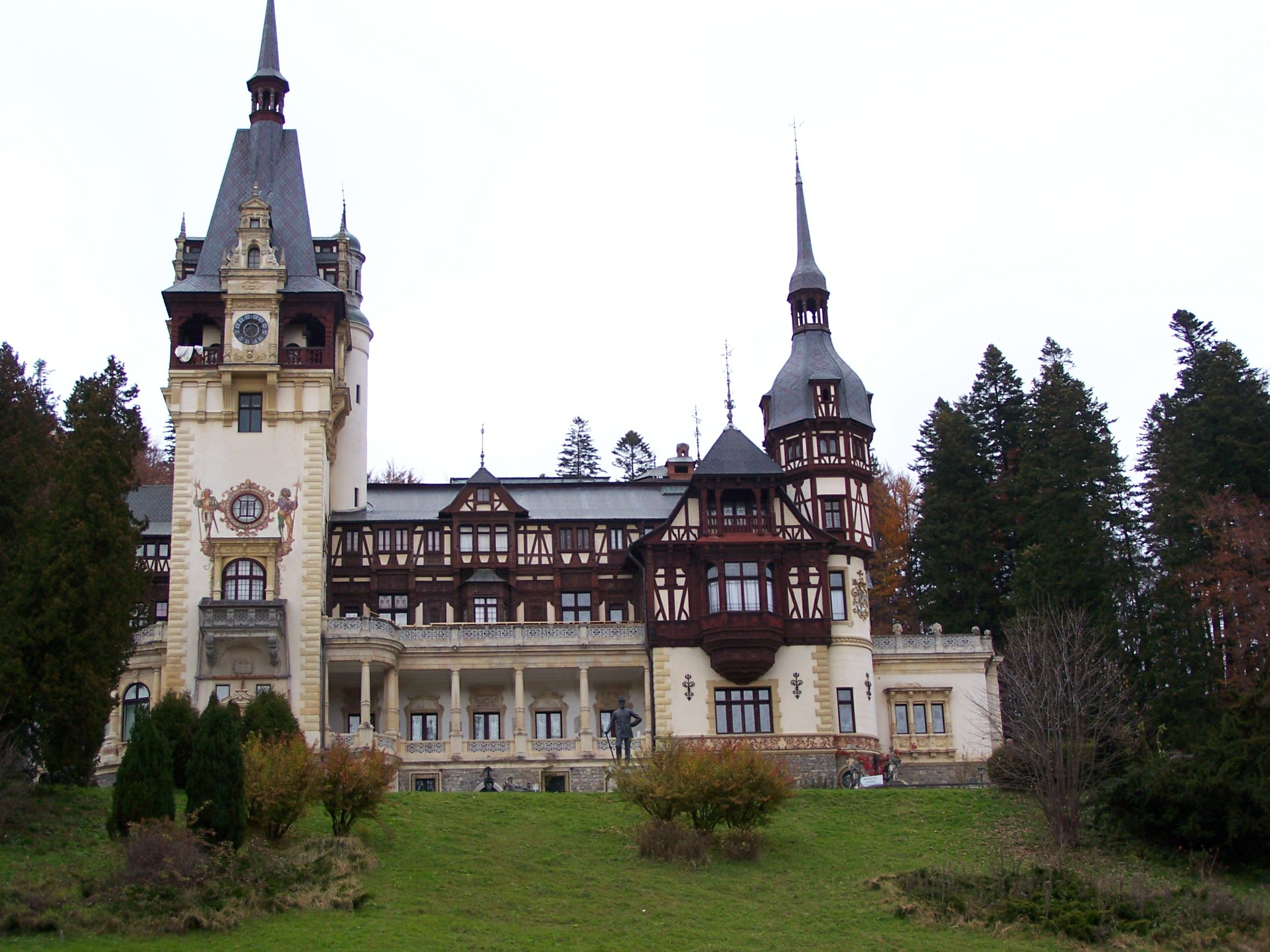 Peleş castle in Sinaia, RomaniaPeles Castle - 2005